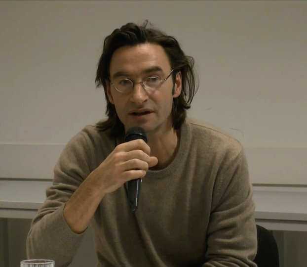 In der Reihe «Die Krise hat Europa gestärkt» Die Europäische Zentralbank (EZB) gilt als Retterin des Euro. Sie beendete Mitte 2012 im Alleingang die Euro-Krise und sorgte für Ruhe an den Finanzmärkten. Gleichzeitig wird die EZB heftig kritisiert, vor allem in Deutschland. Gegen ihre Politik wurde sogar vor dem Bundesverfassungsgericht geklagt. Für die Blockupy-Bewegung wiederum ist die EZB das Symbol einer europäischen Unterdrückungs- und Verarmungspolitik. Was tut die Zentralbank eigentlich, wenn sie «Geldpolitik» betreibt? Was ist ihre Aufgabe, woher kommt ihre Macht? Und wie unterscheidet sie sich von anderen Zentralbanken? Weitere Informationen zur Veranstaltungsreihe unter